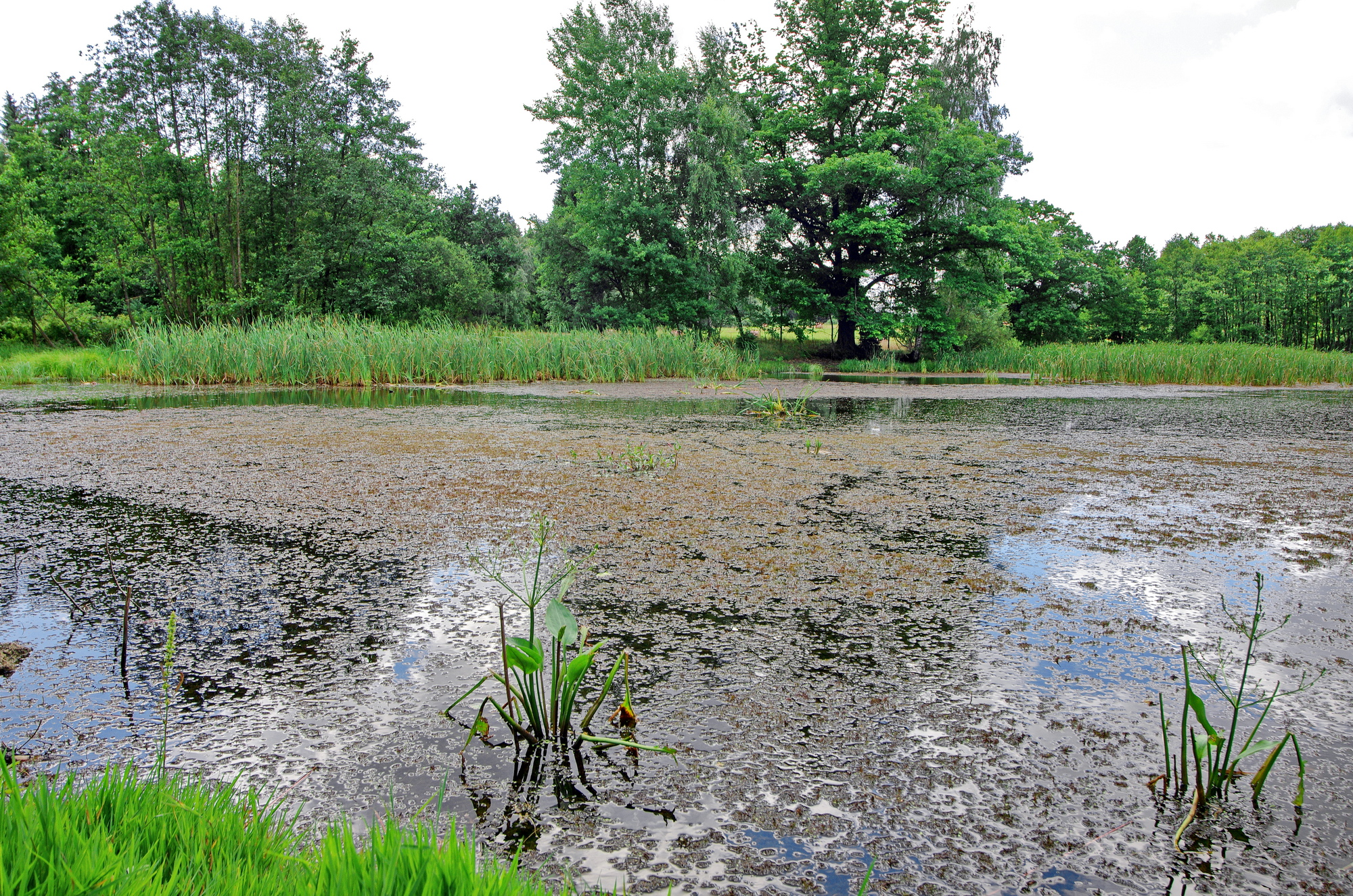 Přírodní rezervace U Sedmi rybníků, okres Cheb